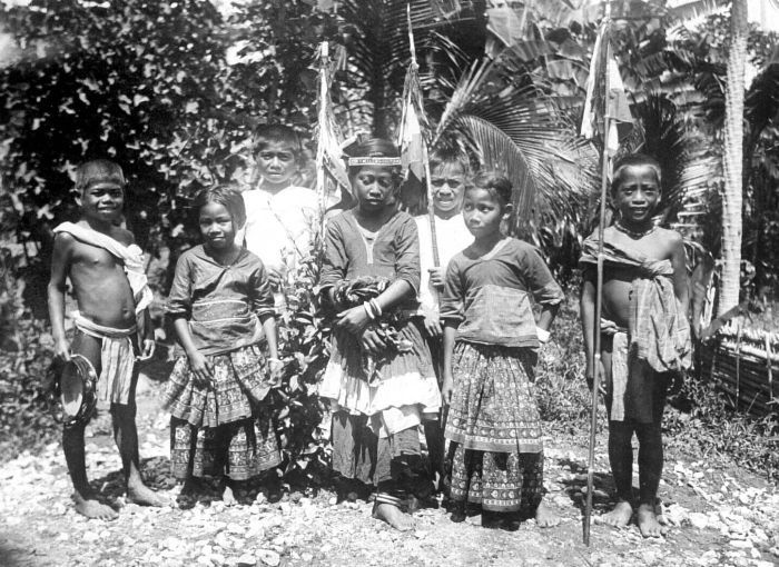 Repronegatief. Leerlingen van de school van het Leger des Heils te Kulawi, Midden-Celebes